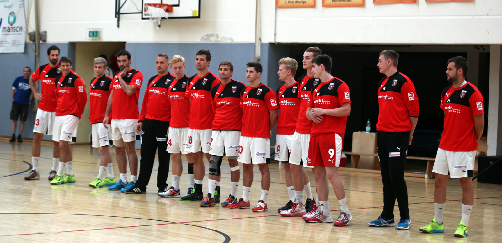 Die Mannschaft der SG Leutershausen im Juli, 2015. Fotografiert am 14. Juli 2015 in der Heppenheimer Nibelungenhalle beim Maisch Cup.